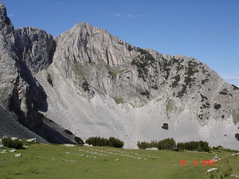 "Sinanitsa" - a summit in Pirin mountain in Bulgaria View of Sinanitsa summit.